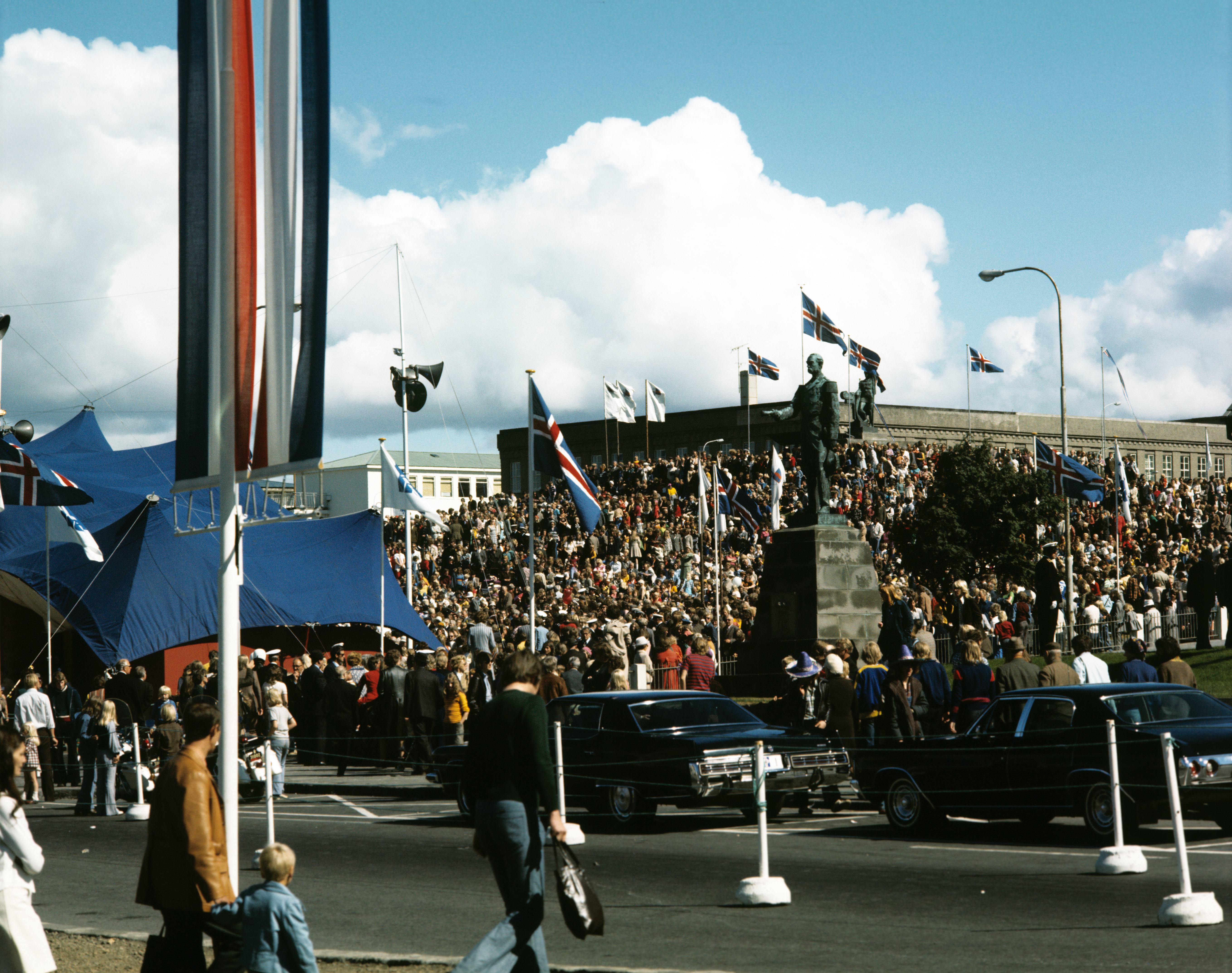 1100-Jahr-Feier der Besiedlung Islands in Reykjavík.